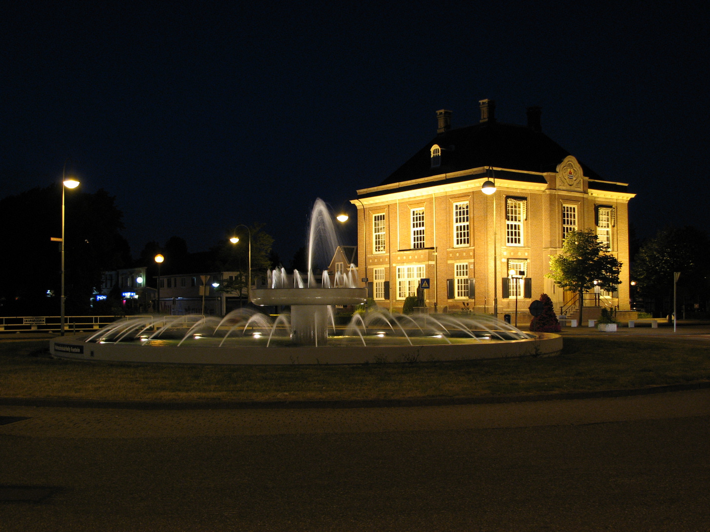 Beursplein, Hoofddorp (centrum) met fontein en het polderhuis. Het polderhuis, gebouwd in 1913, was de vergaderplaats waar het bestuur van de Haarlemmermeerpolder vergaderde over waterbeheersing en waterkering. Het polderhuis is nu een beschermd monument. Het is gebouwd naar een ontwerp van architect Foeke Kuipers in een historiserende bouwtrant die teruggrijpt op het 17e eeuws Hollands classicisme.